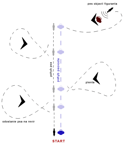 Nacvik obrany so psom - revir